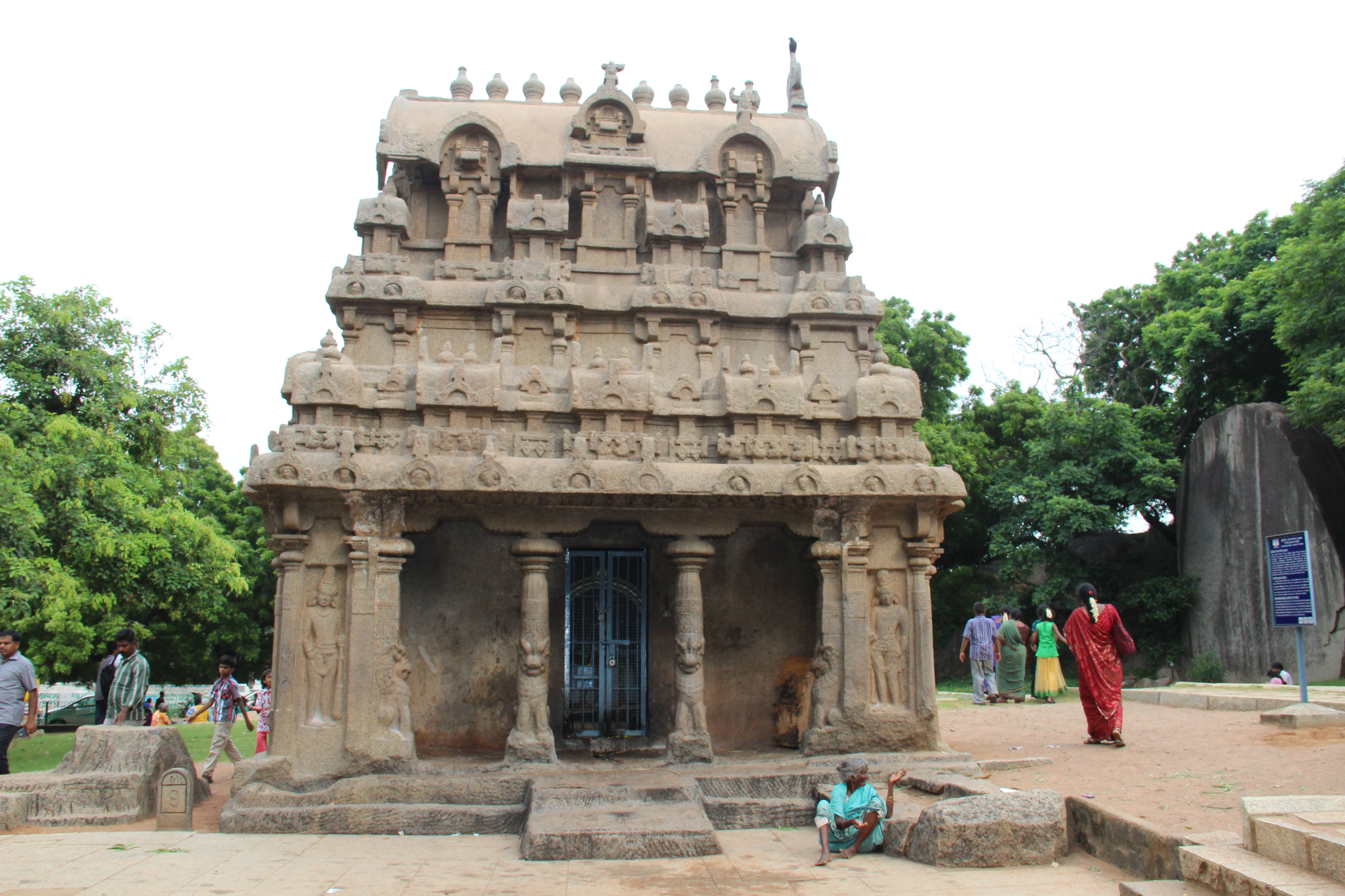 மாமல்லபுரத்திலுள்ள எழிலார்ந்த பிள்ளையார் கற் கோயில்.